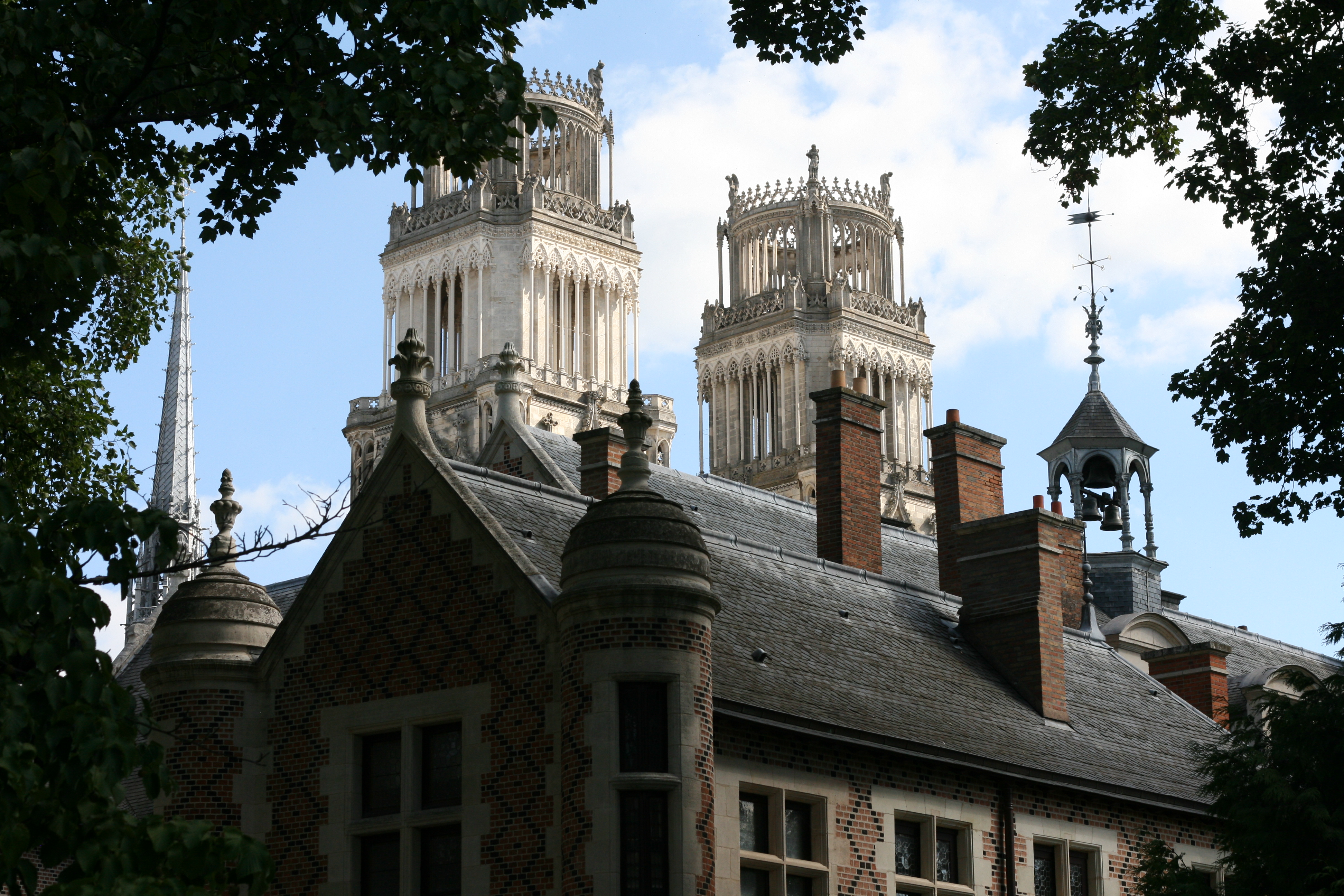 Aperçu depuis un parc.